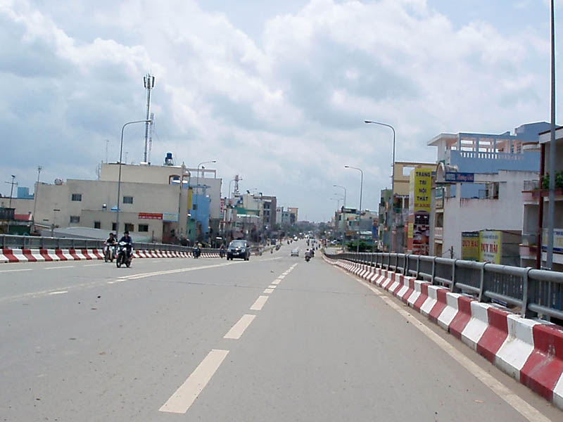 Một đoạn giao thông trên địa bàng Quận 12, Thành phố Hồ Chí Minh